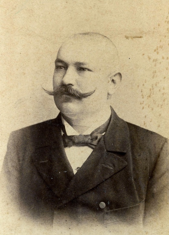 Nemesvitai Viosz Ferenc (1861–1918) nagykanizsai főszolgabíró